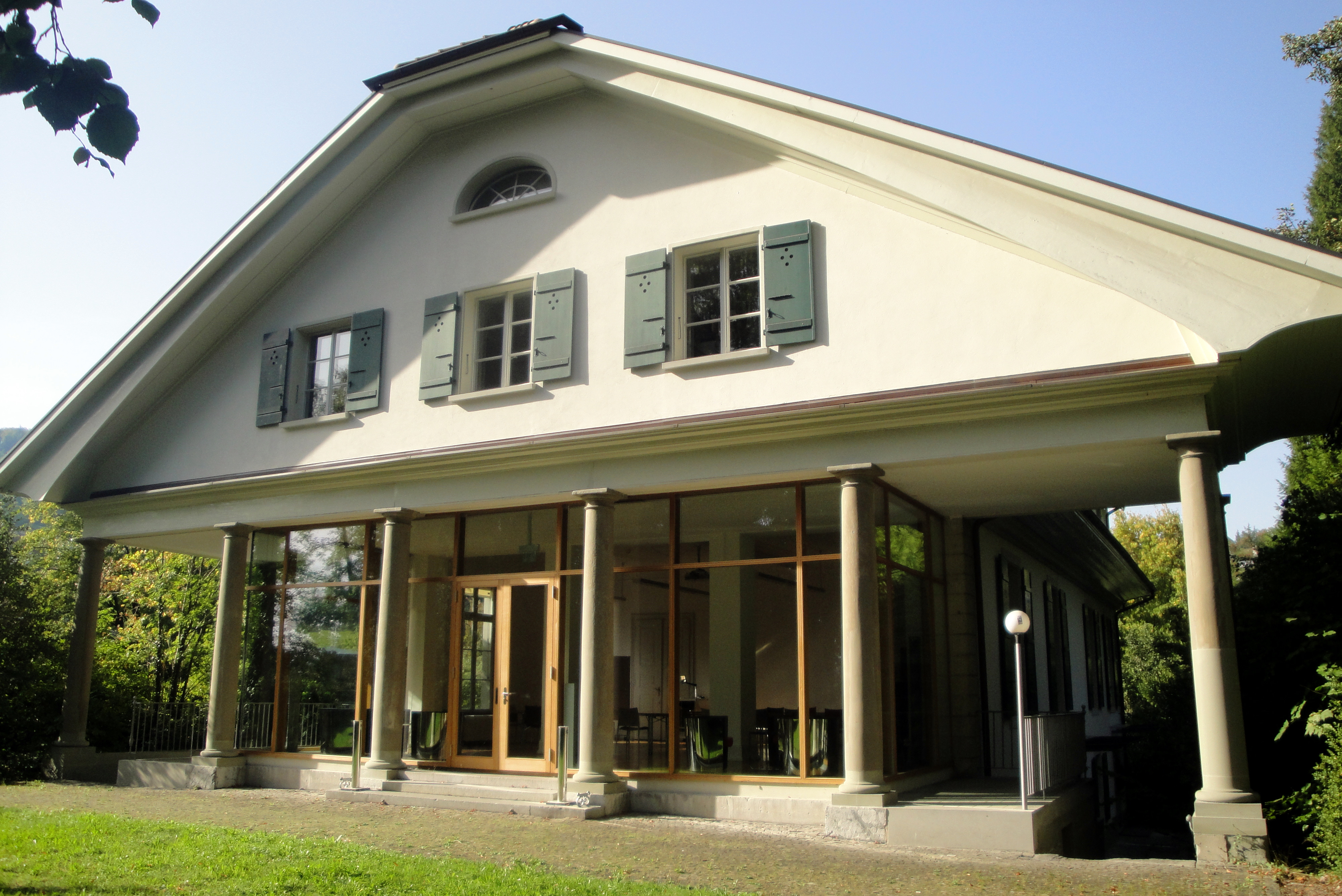 Bern, Berner Designstiftung (ehemals Bernische Stiftung für angewandte Kunst und Gestaltung) in der Campagne Bellevue.